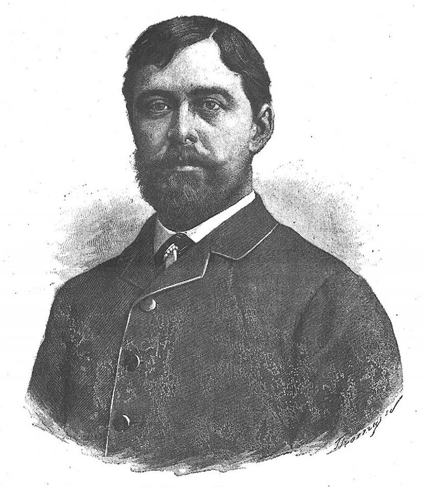 Secretario de Don Carlos